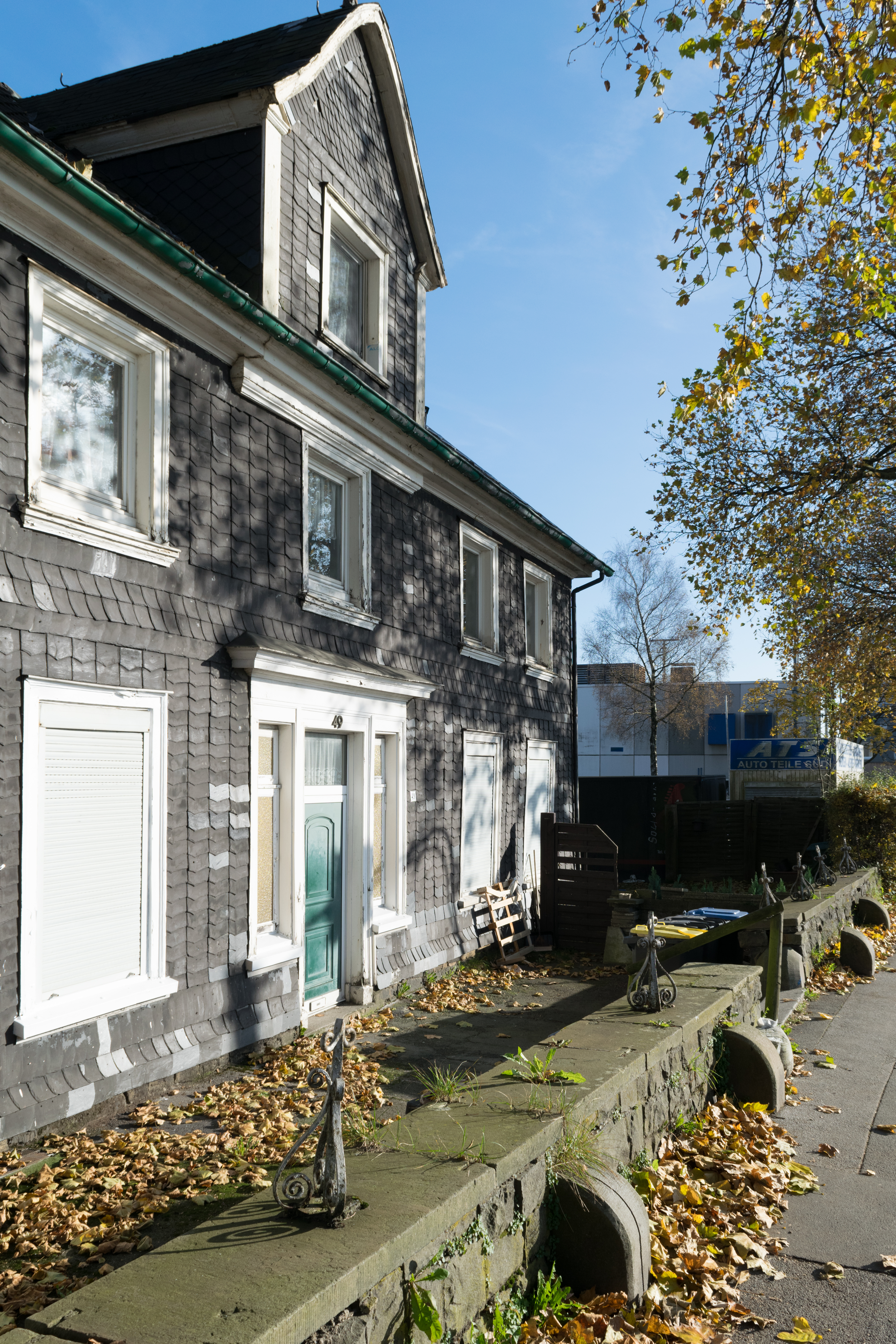 Hahnerberger Straße, Wuppertal